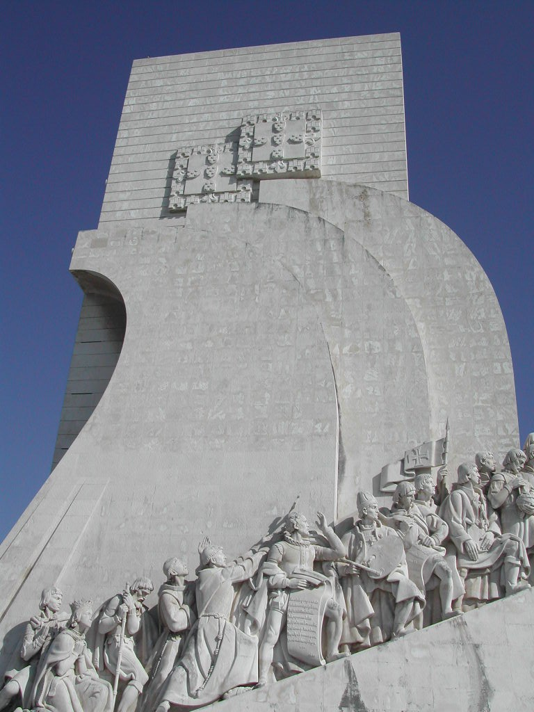 Lissabon Padrao dos Descobriments.